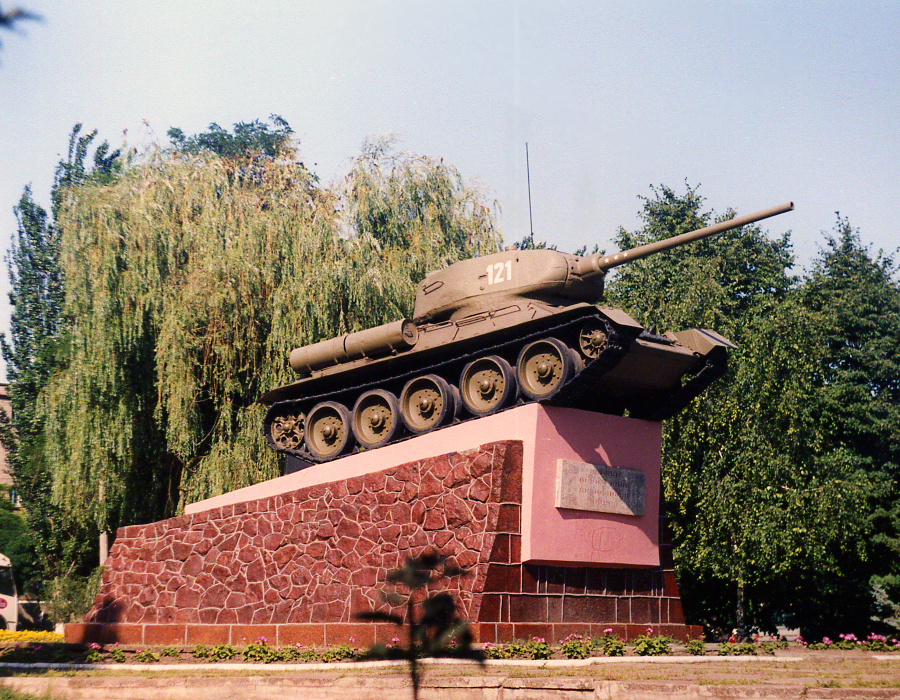 Мариуполь, памятник-танк Т-34-85.